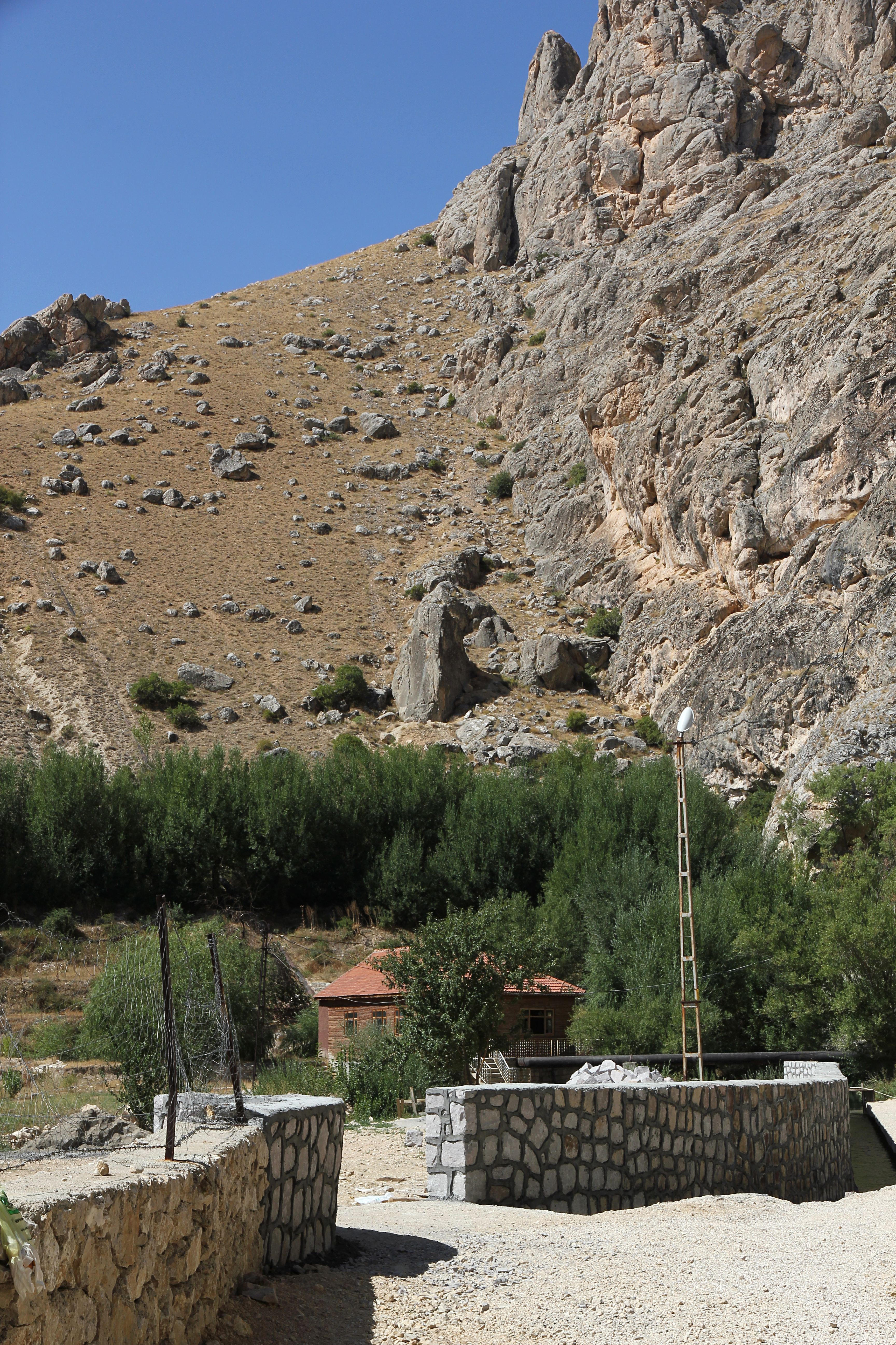 Luwische Felsinschriften von Gürün, Zentraltürkei, Obere Inschrift "Gürün B". Hinter Buschwerk am rechten Felshang liegt Inschrift "Gürün A"